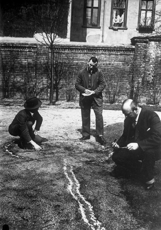 Ein interessanter Blick in die Hochschule für Kriminalisten in Berlin-Charlottenburg ! An Hand von Kriminalistischem-Material, das aus den Kapitalverbrechen der letzten Zeit hier zusammengetragen wurde, werden die Kriminalanwärter ausgebildet. Die Kriminalbeamten kommen aus sämtlichen deutschen Provinzen hier her und werden nach vollendetem Kursus ihren zustehenden Polizeiämtern zugeteilt. Der geübte Kriminalist bei der Arbeit. Der Tatort mit Kampfplatz und Schleifspuren des Opfers, wird von den Kriminalisten mit Lupe und Centimetermass genauestens untersucht.